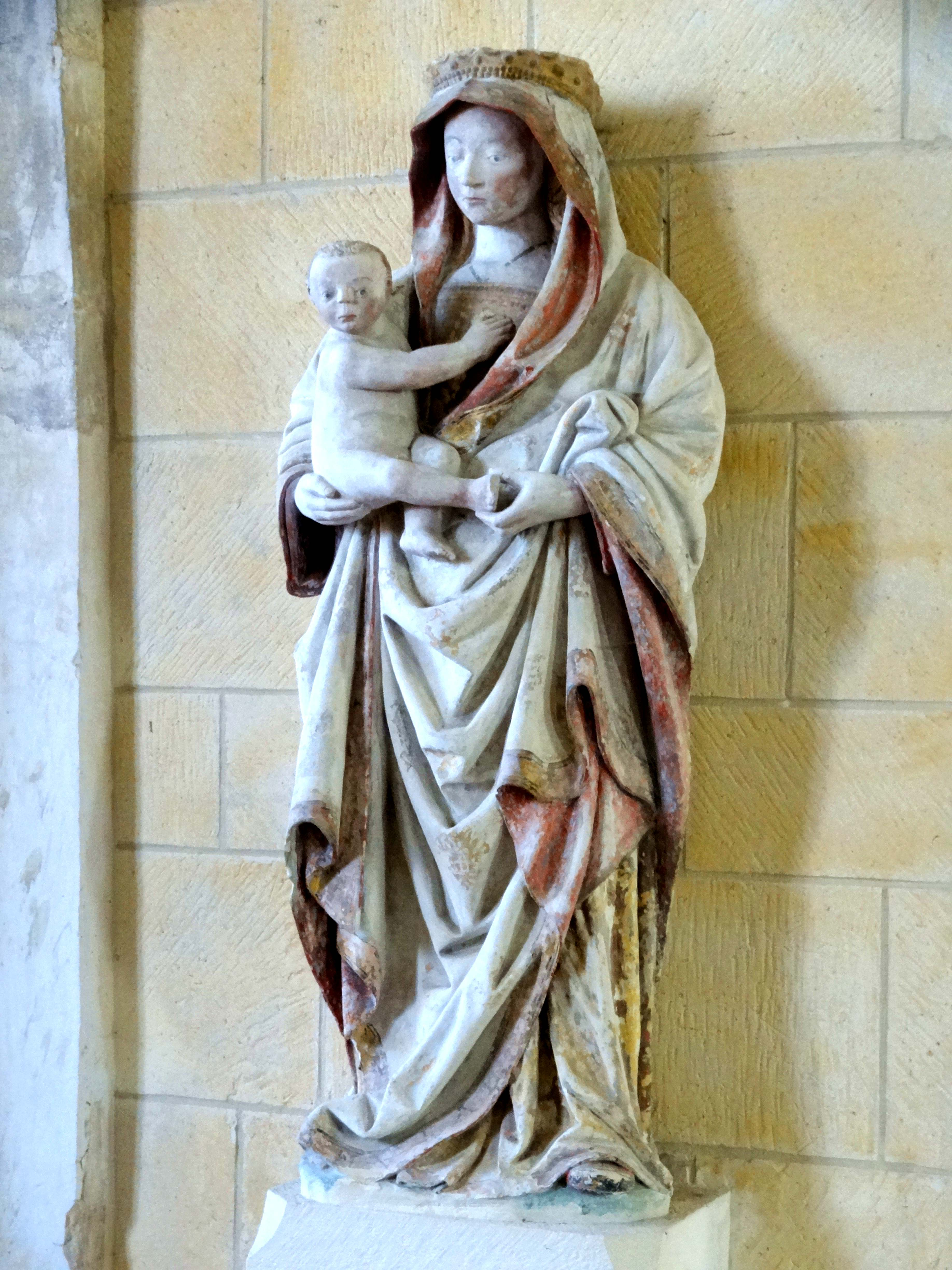 Vierge à l'Enfant, 2e moitié XVe siècle.